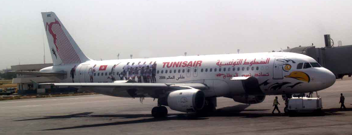 Un A320 de Tunis Air aux couleurs de la coupe du monde 2006 Photo personnelle Bertrand Bouret Retouchée par Karta24